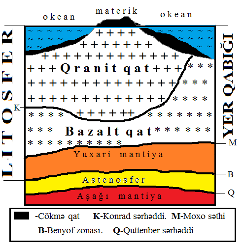 Litosferin quruluşu